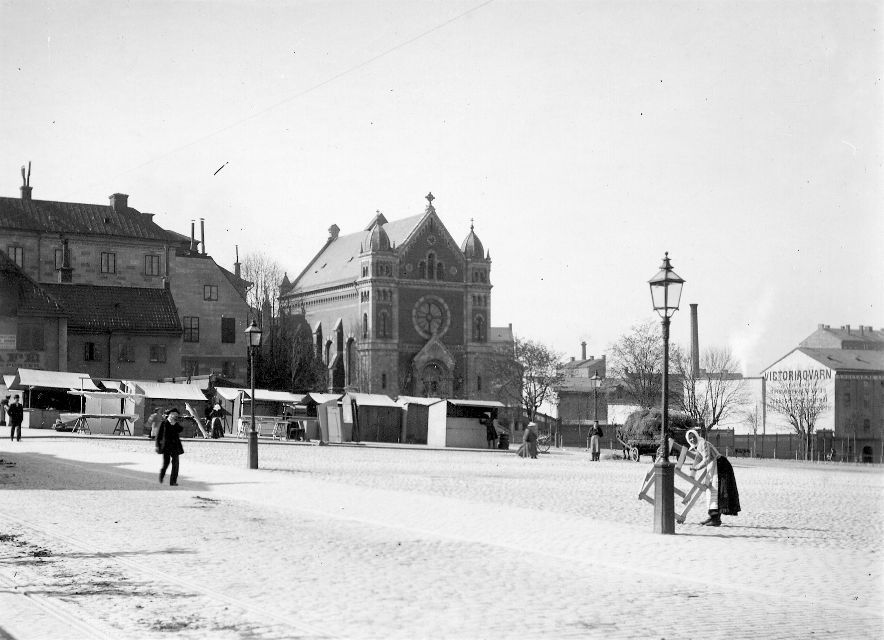 Stockholms katolska domkyrka och Victoria ångkvarn (längs till höger). I förgrunden Södra Bantorget